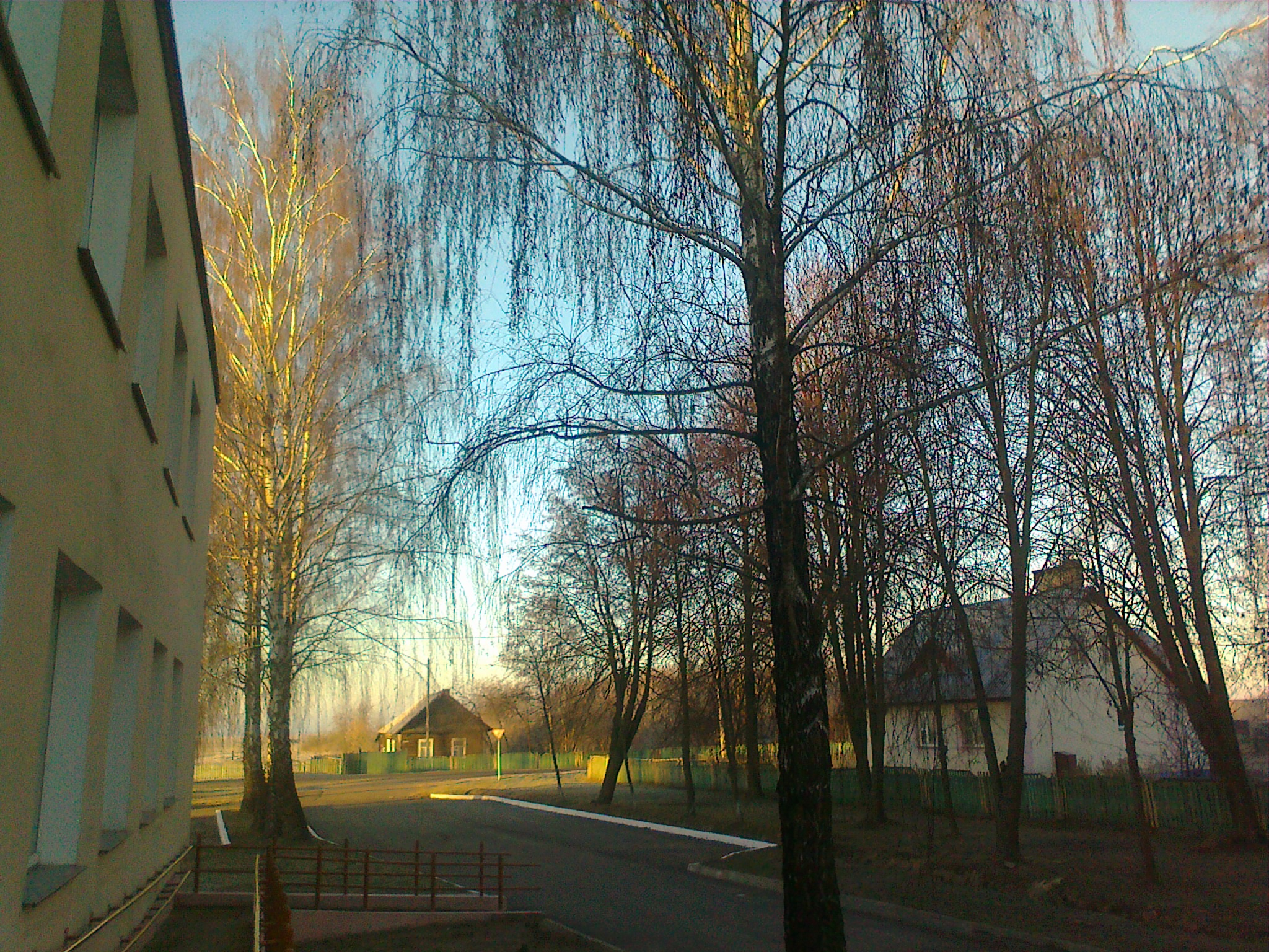 Ивановка, Бобруйский район